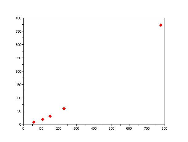 période en fonction du demi-grand axe (loi de Kepler) pour illustrer l'article repère log-log Image personnelle créée avec Scilab